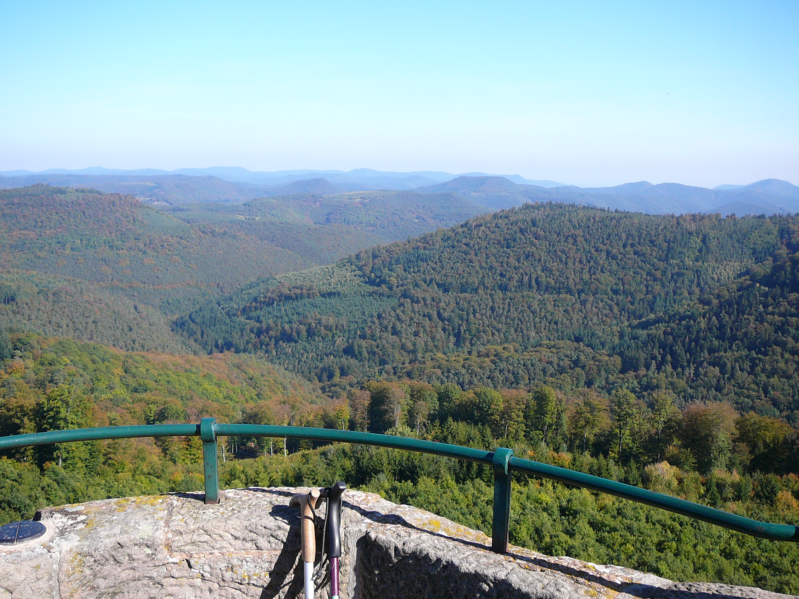 Blick vom Luitpoldturm auf dem Weißenberg nach Osten: Am Horizont Kalmit, Kesselberg und Roßberg